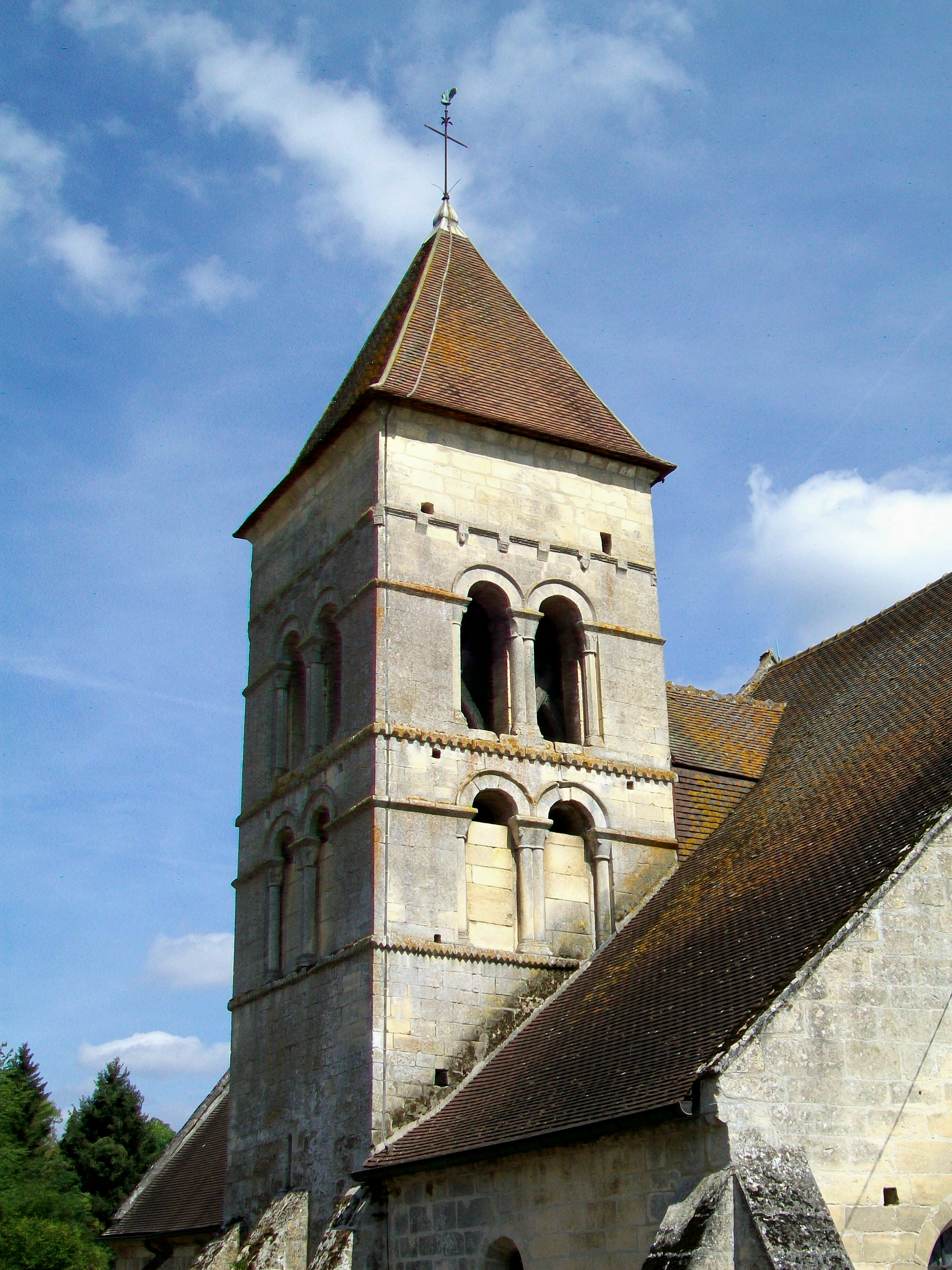 Le clocher roman de l'église Saint-Martin. Les autres éléments sont gothiques.